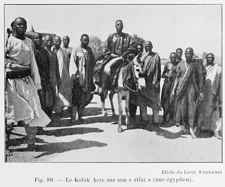 Le Kolak Acyl sur son "rifaï" (âne égyptien). From L'Afrique Équatoriale Française: le pays, les habitants, la colonisation, les pouvoirs publics. Préf. de M. Merlin. Avec 186 reproductions photographiques, 33 diagrammes, profils, et 7 cartes dont 5 en couleurs, (published 1918).